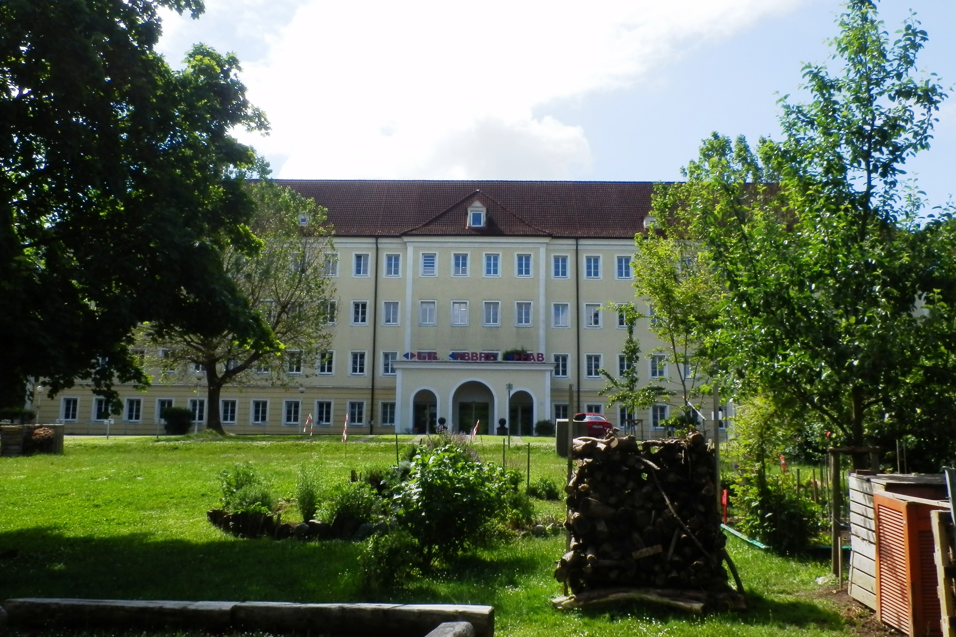 Ehemalige VÖEST-Generaldirektion Linz Muldenstraße